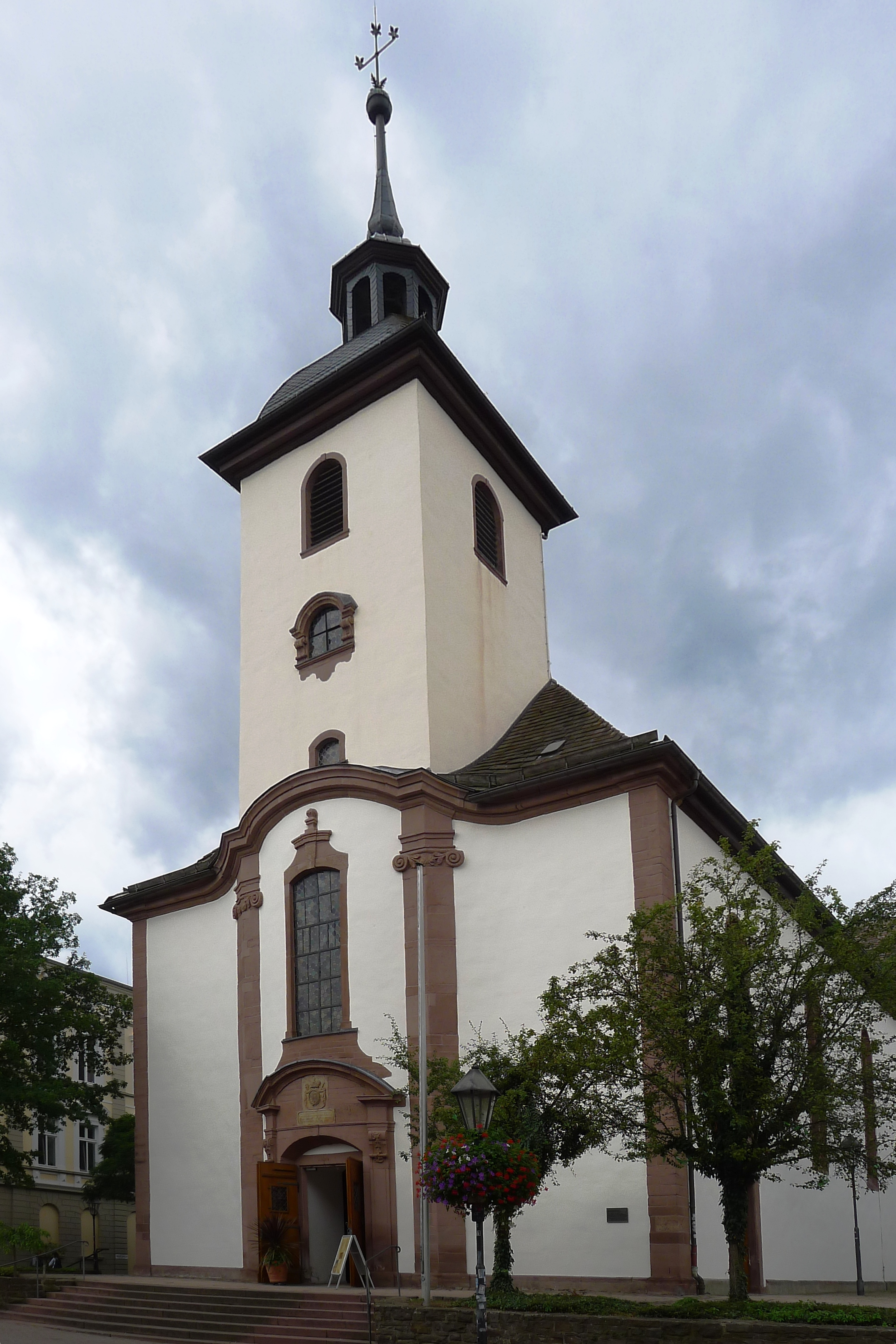 Die katholische Pfarrkirche St. Nikolai ist ein denkmalgeschütztes Kirchengebäude in Höxter